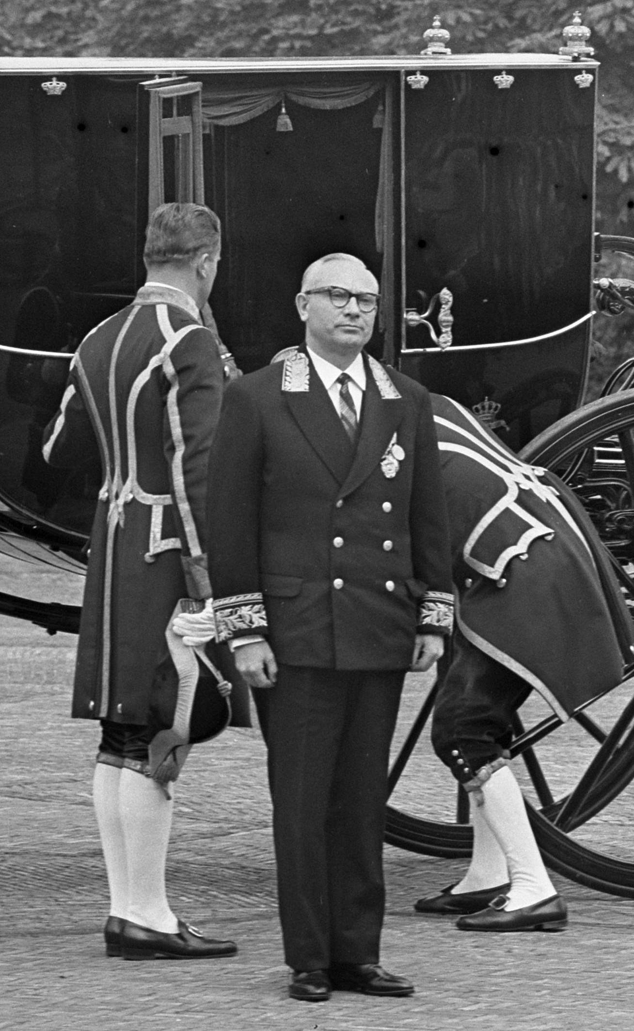 De Russische ambassadeur Lavrov arriveert per koets bij Huis ten Bosch